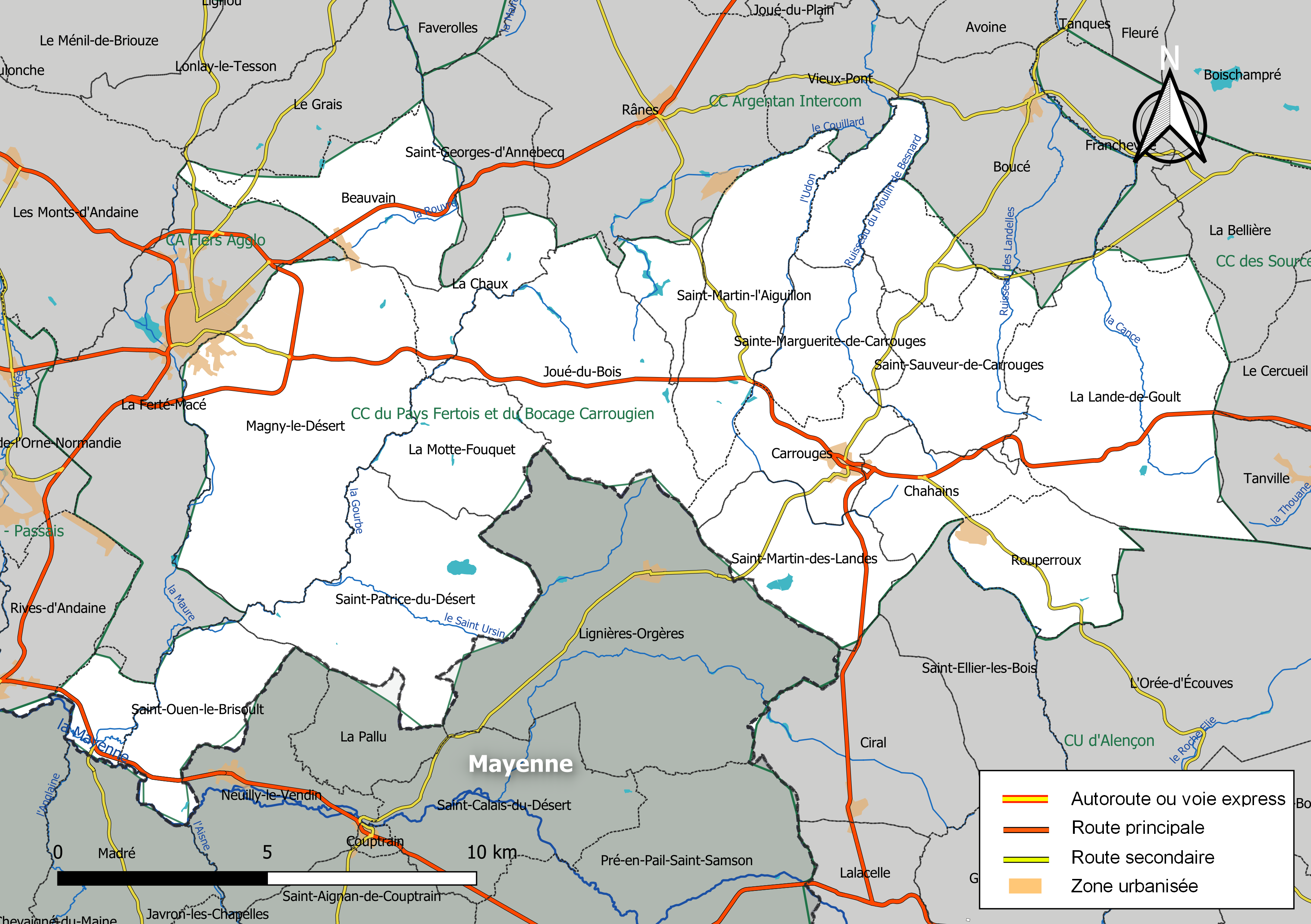 Carte géographique de la Communauté de communes du Pays Fertois et du Bocage Carrougien, département de l'Orne, France. Composition au 1er janvier 2019.